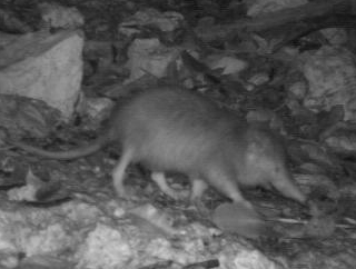 Solenodonte forrajeando por la noche en el Parque Nacional Jaragua